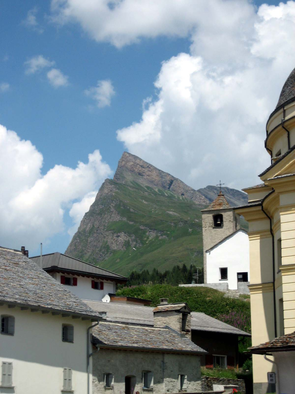 Kapelle